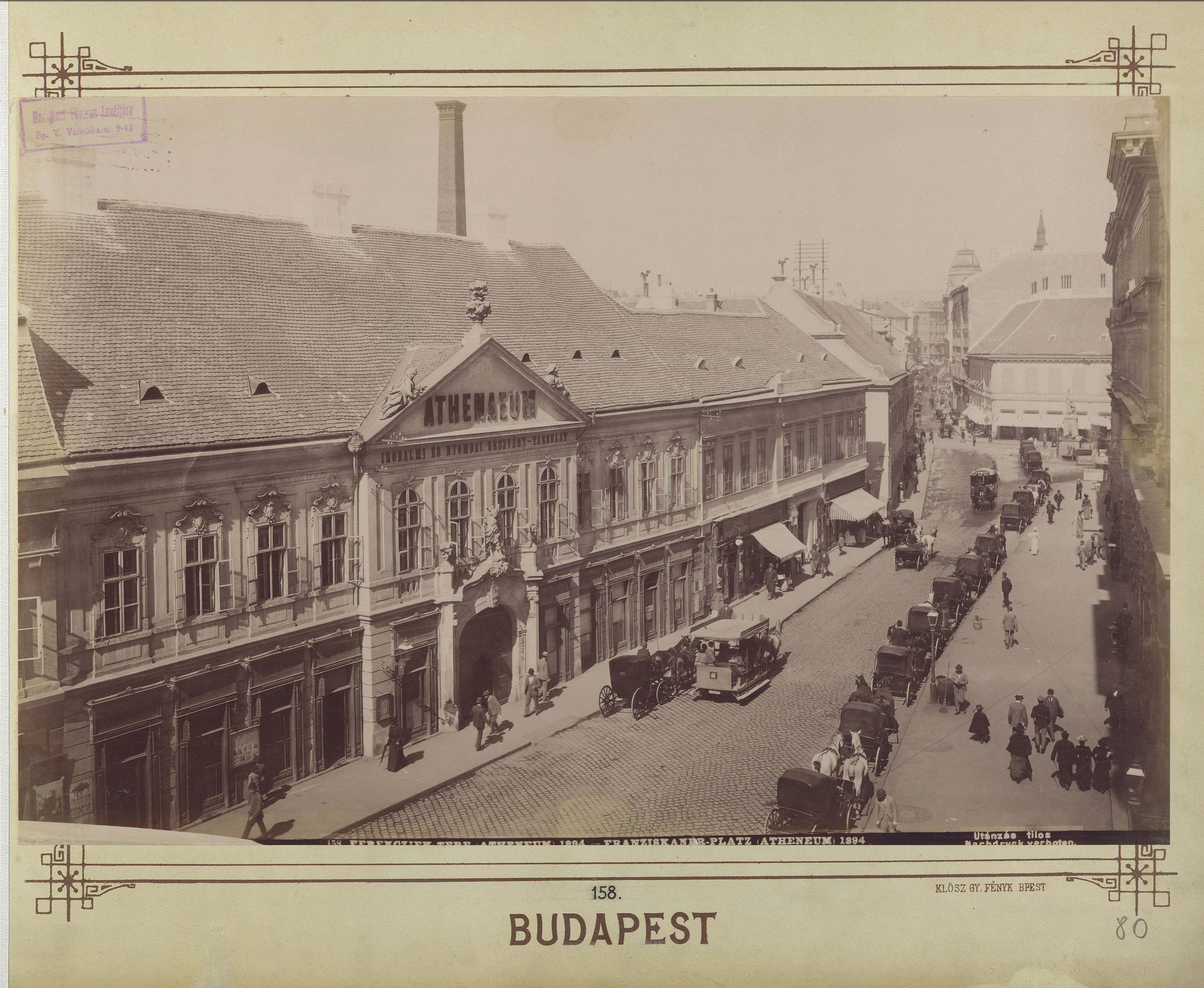 Ferenciek tere a Reáltanoda utcától a Kossuth Lajos utca felé nézve. Hátul szemben a Petőfi Sándor (Koronaherceg) utca, balra az Athenaeum Irodalmi és Nyomdai Rt. épülete. A felvétel 1894-ben készült. A kép forrását kérjük így adja meg: Fortepan / Budapest Főváros Levéltára. Levéltári jelzet: HU.BFL.XV.19.d.1.07.158 Location: Hungary, Budapest V. Tags: fiacre, omnibus, street view, carriage, Budapest